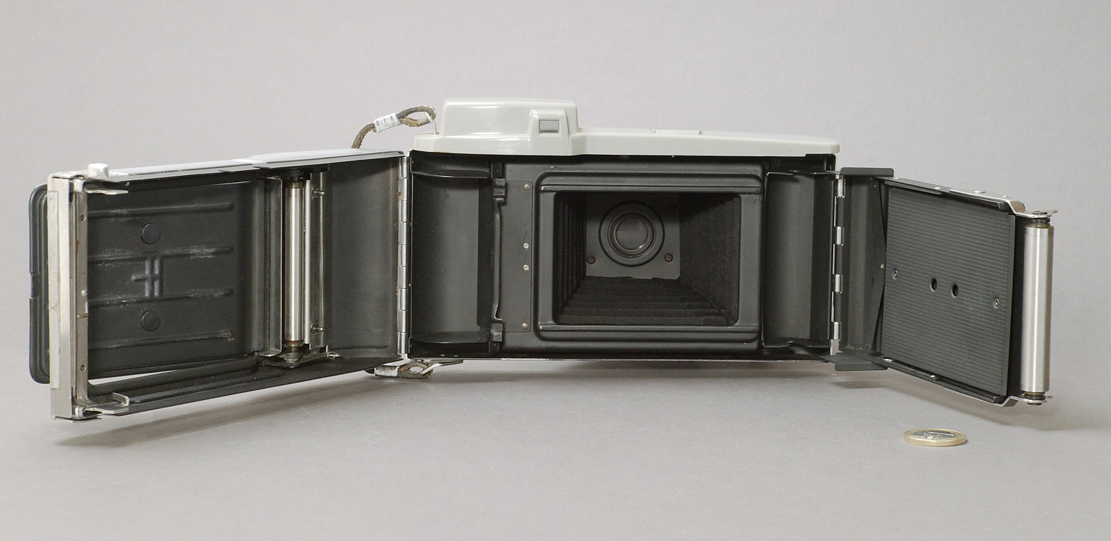 Polaroid Land camera model 80, Gehäuse geöffnet, Objektiv ausgeklappt